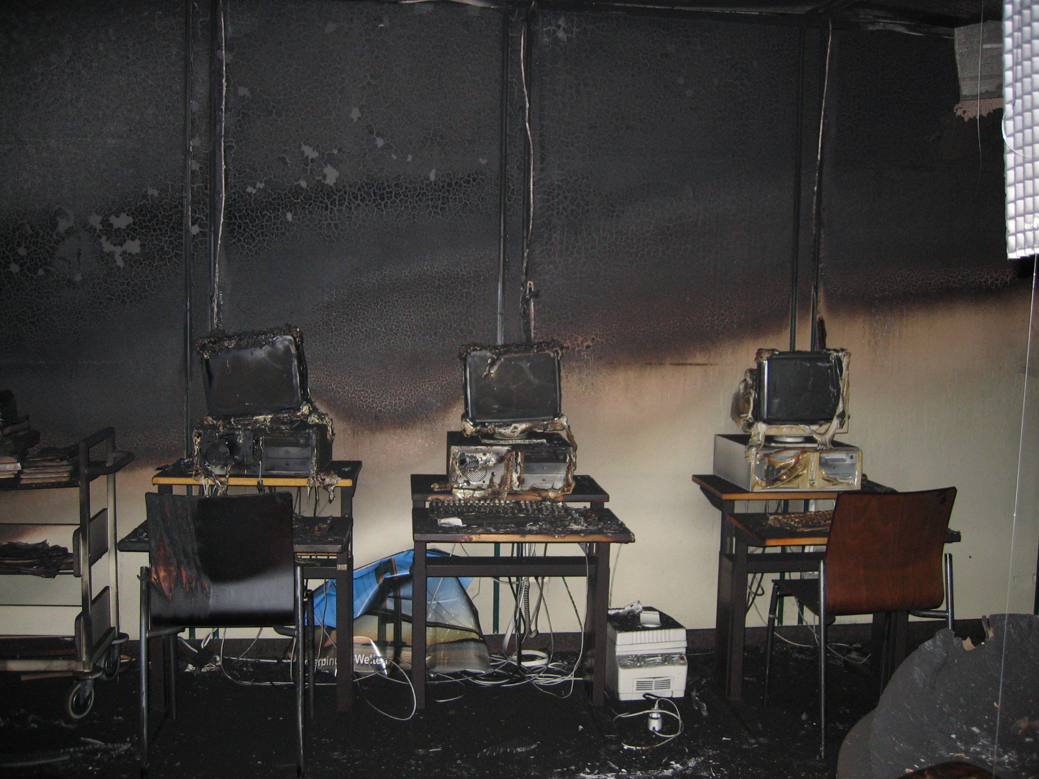 Brand an der Wirtschaftsuniversität Wien (13./14. Dezember 2005)